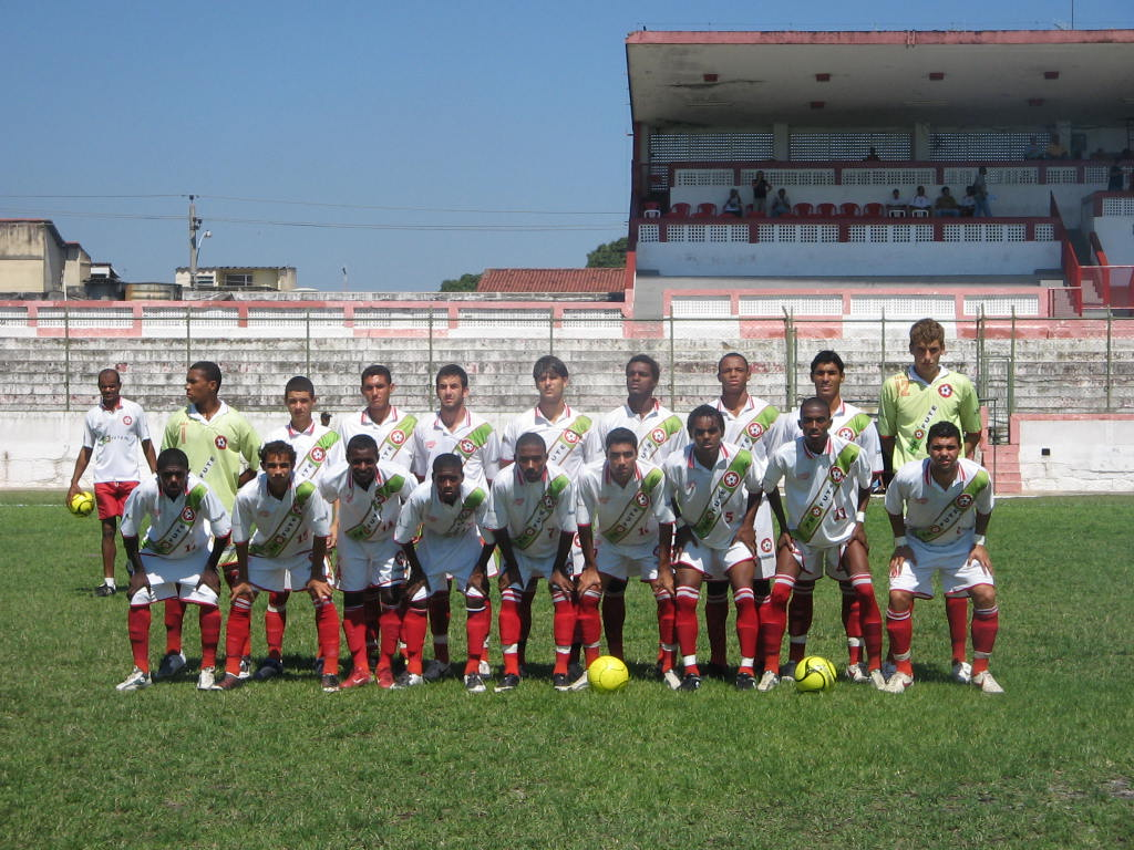 Equipe de juniores do Profute FC, em 2007.